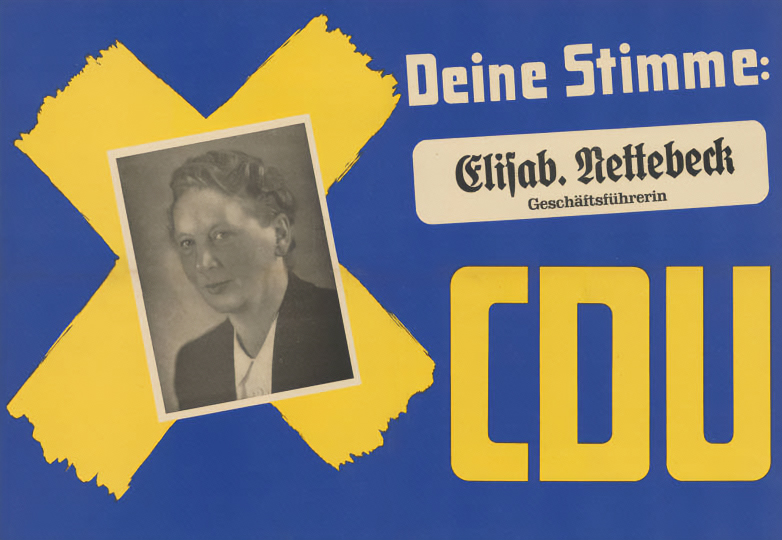 Deine Stimme: Elisab. Nettebeck Geschäftsführerin CDUAbbildung:Porträtfoto - StimmkreuzPlakatart:Kandidaten-/Personenplakat mit PorträtObjekt-Signatur:10-009 : 176Bestand:Landtagswahlplakate Nordrhein-Westfalen (10-009)GliederungBestand10-18:Landtagswahlplakate Nordrhein-Westfalen (10-009) » Landtagswahl am 18.6.1950 » CDU » mit PorträtfotoLizenz:KAS/ACDP 10-009 : 176 CC-BY-SA 3.0 DE